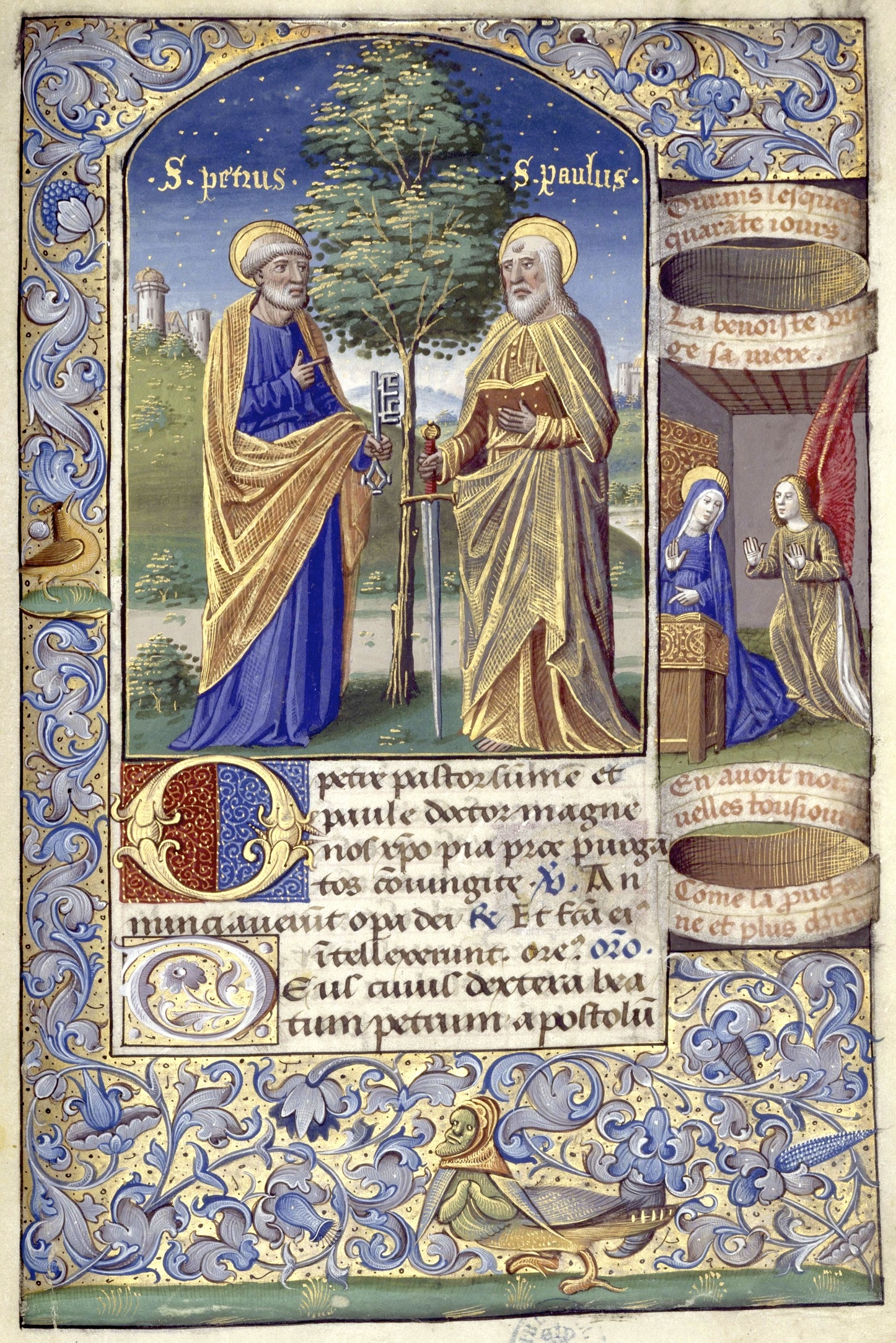 Heures de Charles VIII fol. 104R Pierre et Paul